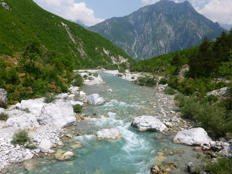 Lumi i Shalës (Palna e Tasit)